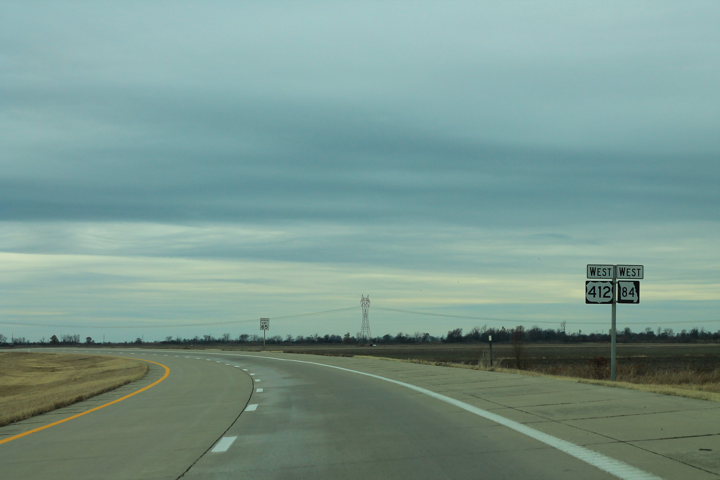 US412 MO84 West Signs